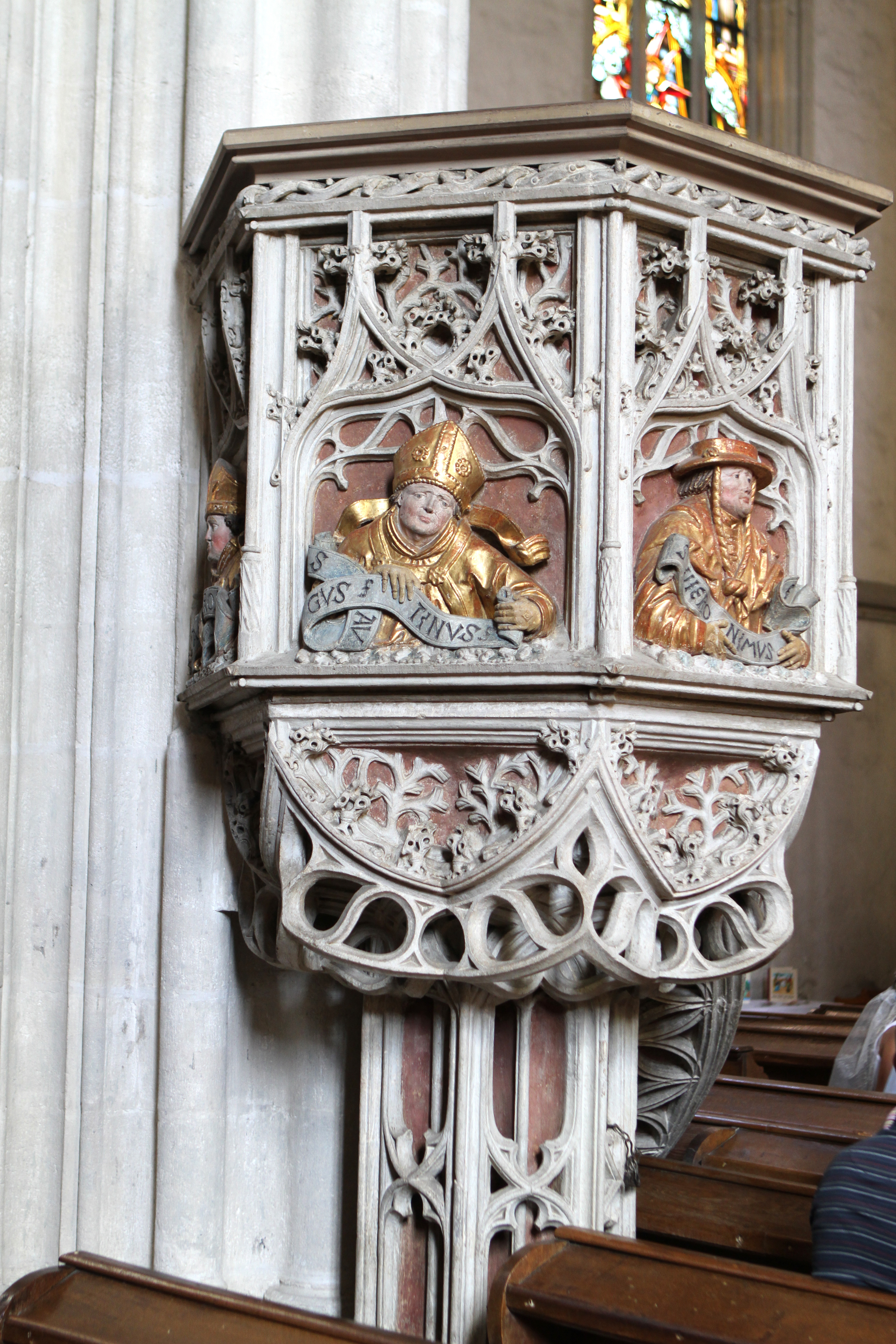 Kath. Pfarrkirche hl. Stephanus